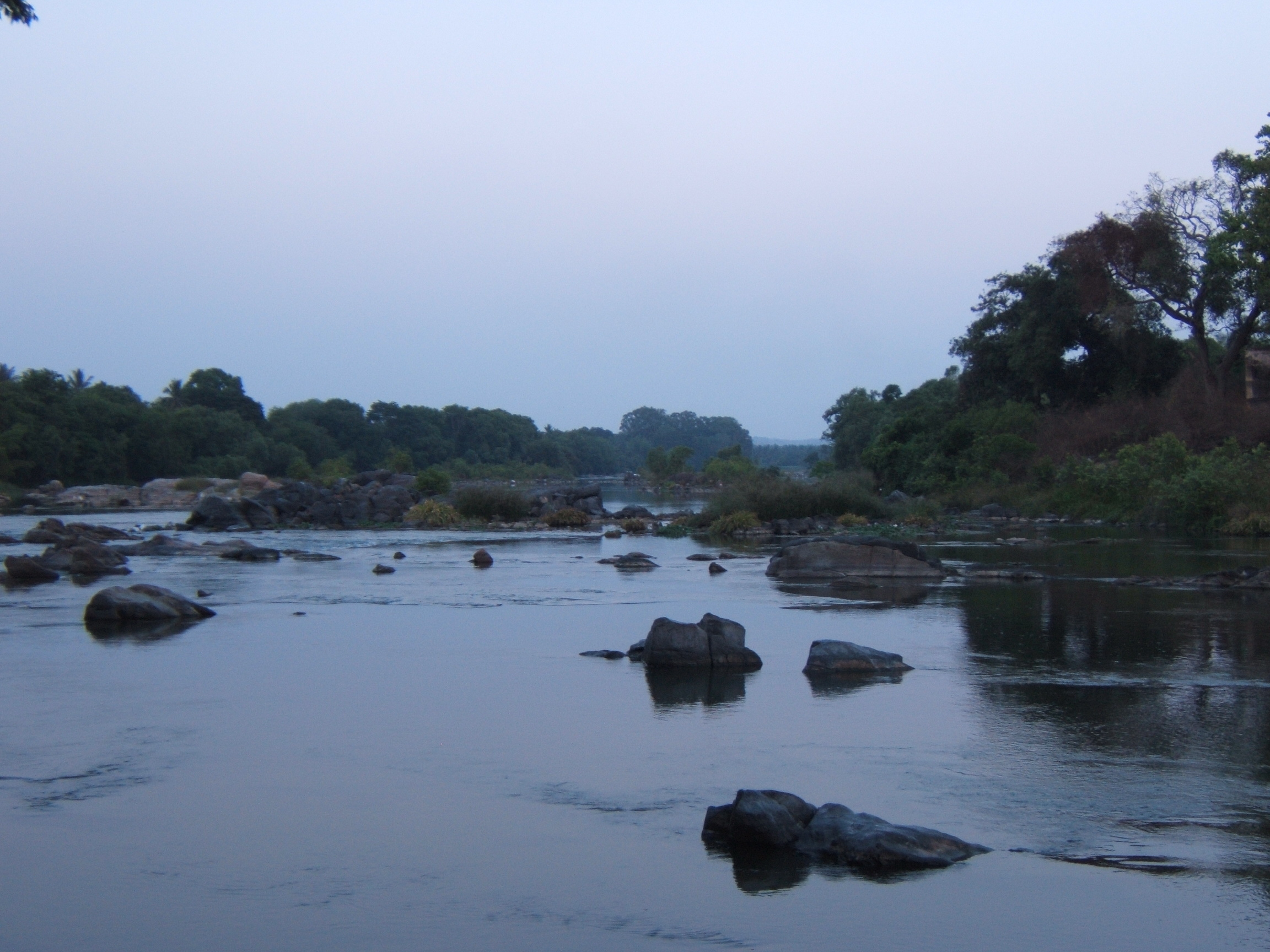 Srirangapatnam, Karnataka, India Sunset at Kaveri river at Shrirangapatnam